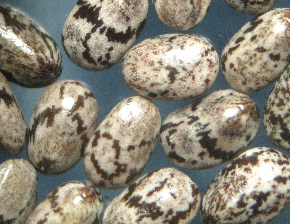 Samen der Mexikanischen Chia (Salvia hispanica) vergrößert